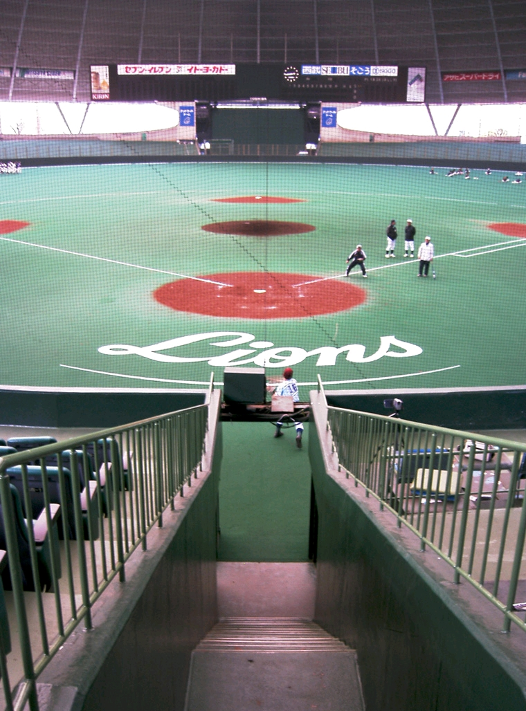 “Seibu Dome” Seibu Lions professional baseball team located in Tokorozawa, Saitama, Japan. “西武ドーム” 日本の埼玉県所沢市にあるドーム式野球場。日本のプロ野球パリーグに加盟する、西武ライオンズのホーム球場でもある。